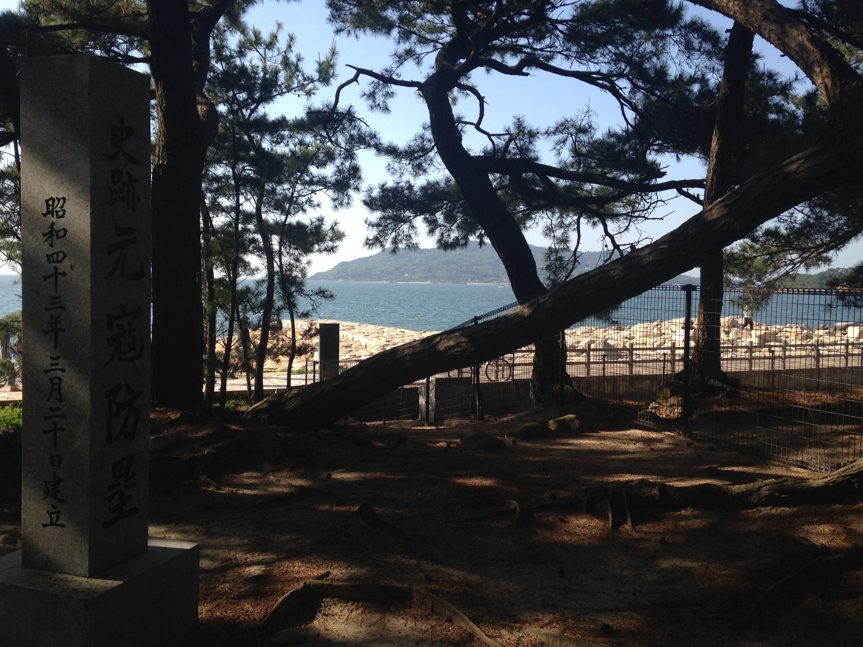 博多湾岸の生の松原と元寇防塁の石碑